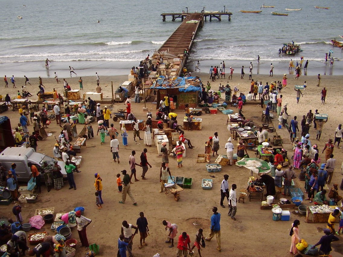 Fishmarket in Bakau